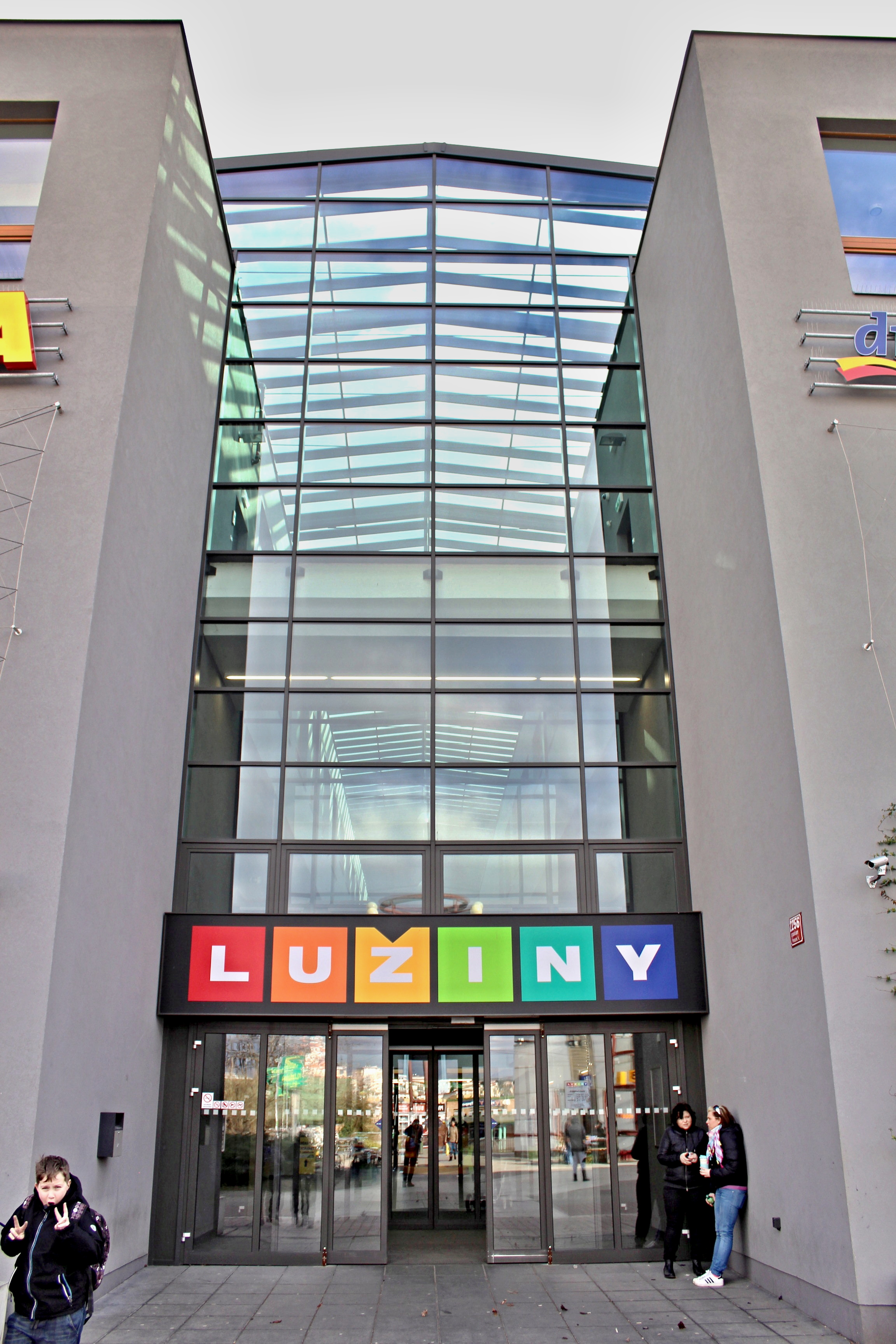 Nákupní centrum Lužiny